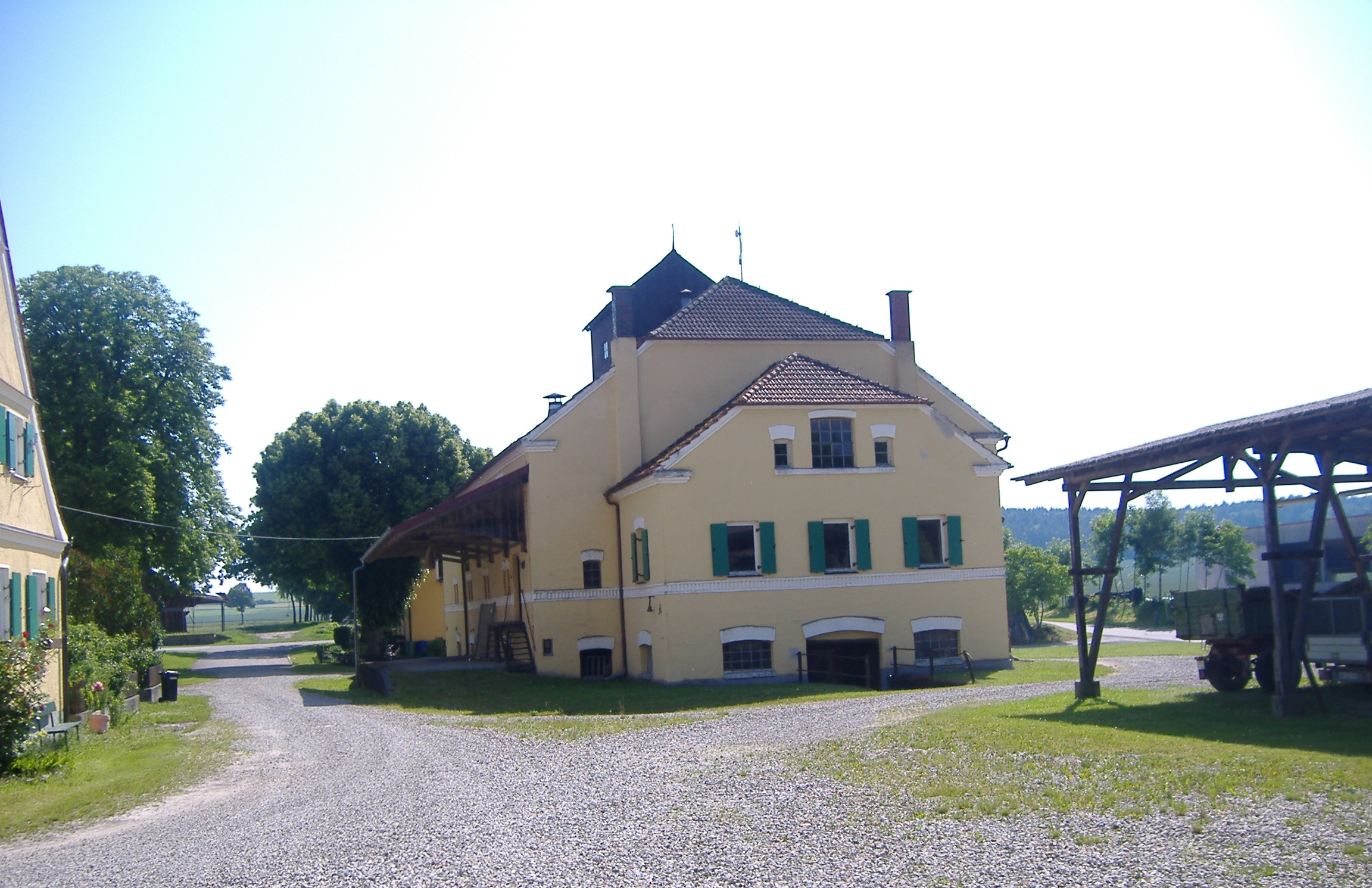 Gut Hemerten